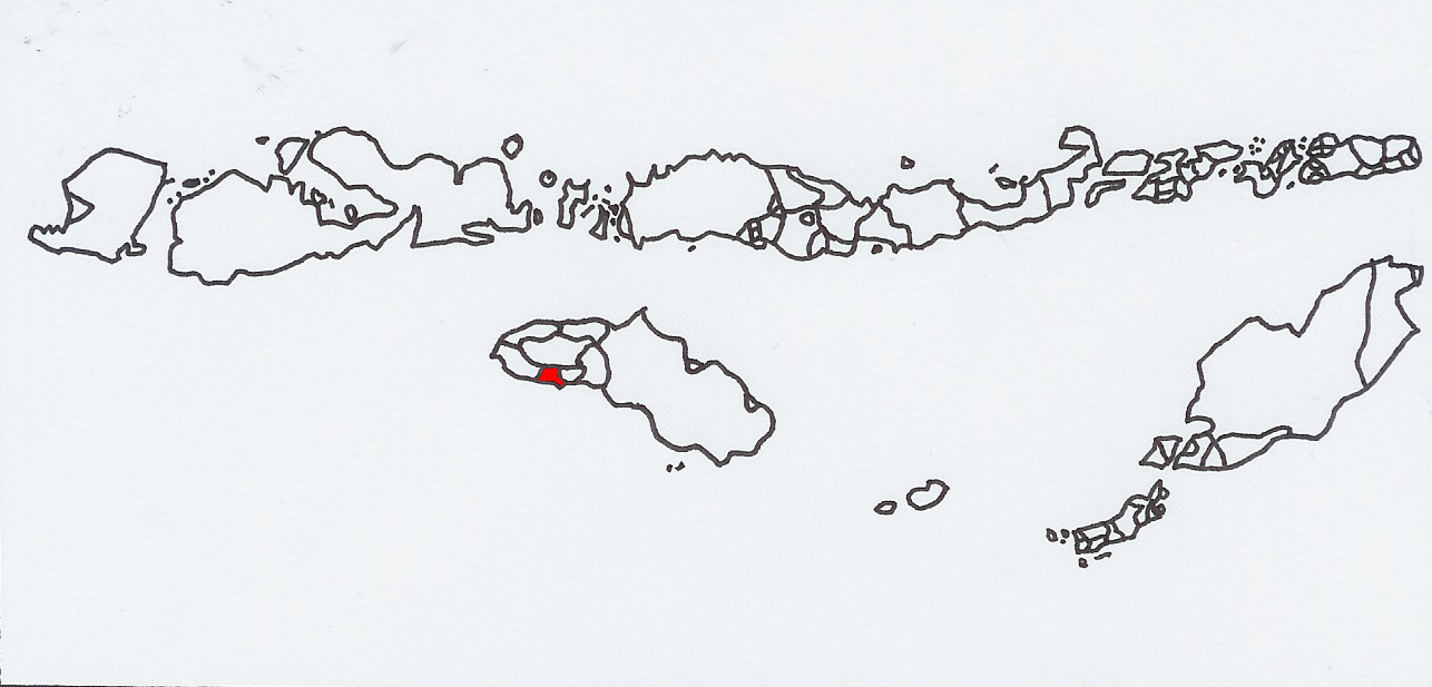 Het Lambojaas tussen de andere talen van het Indonesische gedeelte van de Kleine Soenda-eilanden. Eigen werk, vrij voor het publiek. C&T 17 mrt 2006 21:30 (CET)